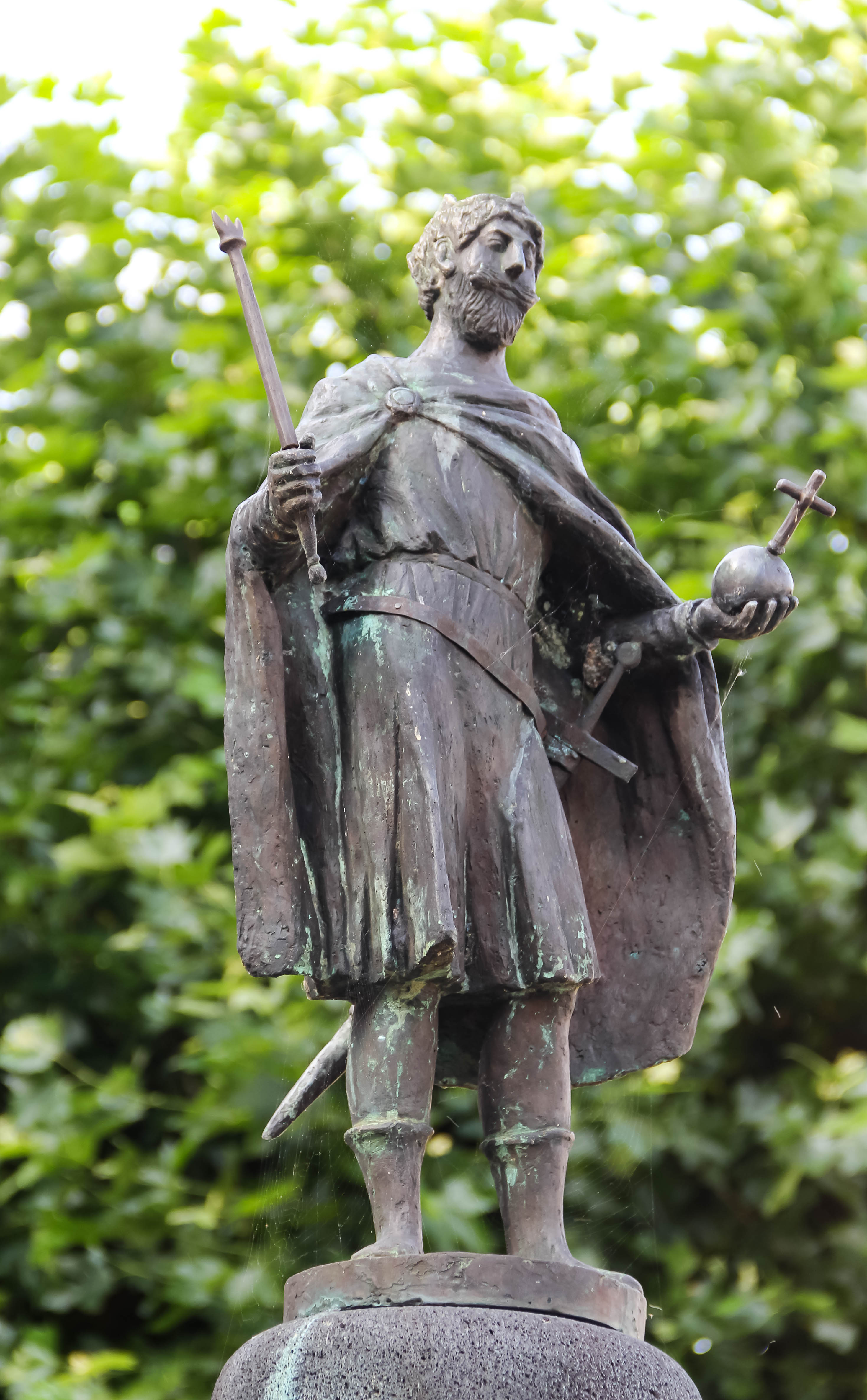 Der Zwentibold-Brunnen am Markt von Bad Münstereifel. Die Statue wurde von Theo Heiermann gestaltet.